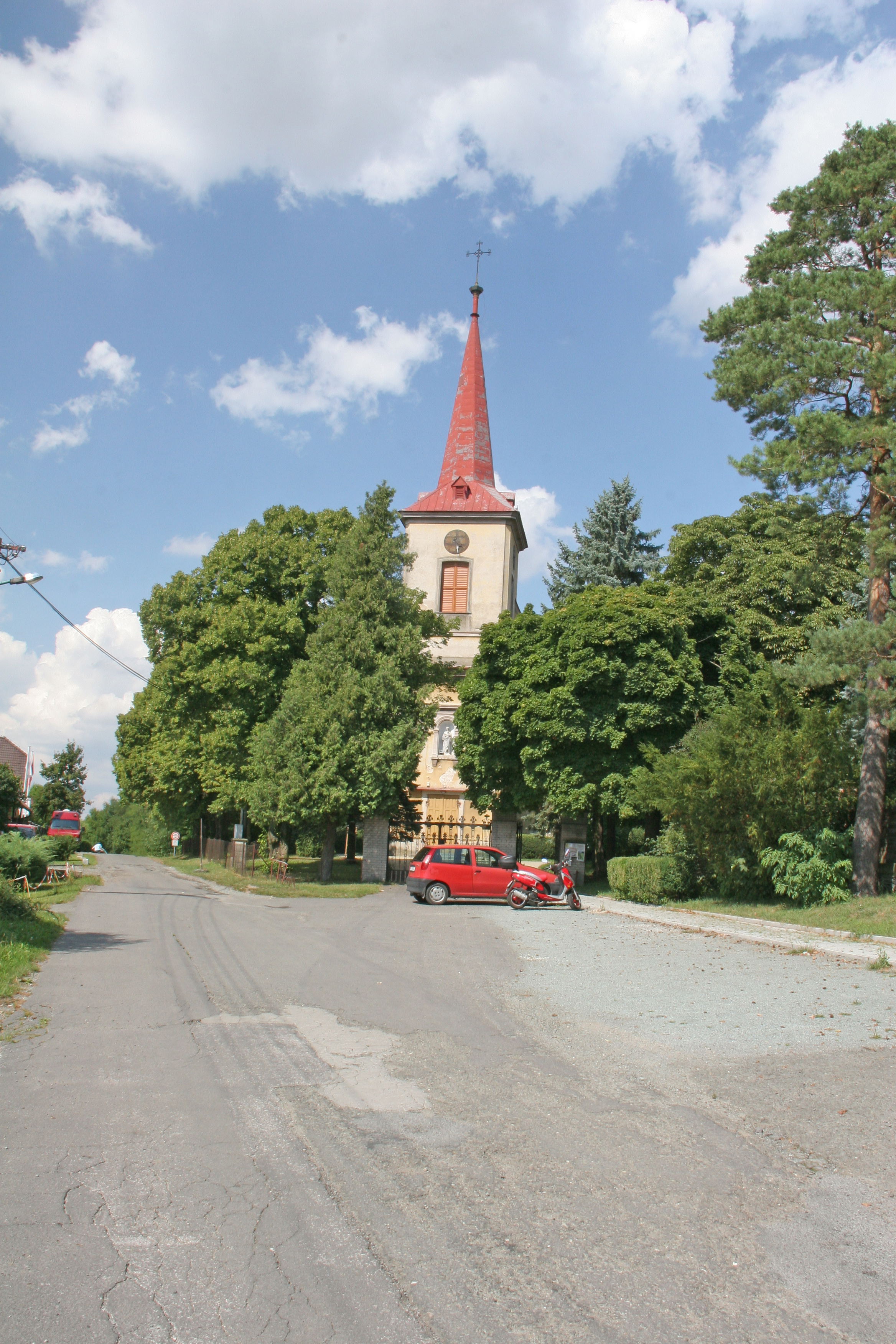 Černilov kostel sv. Štěpána